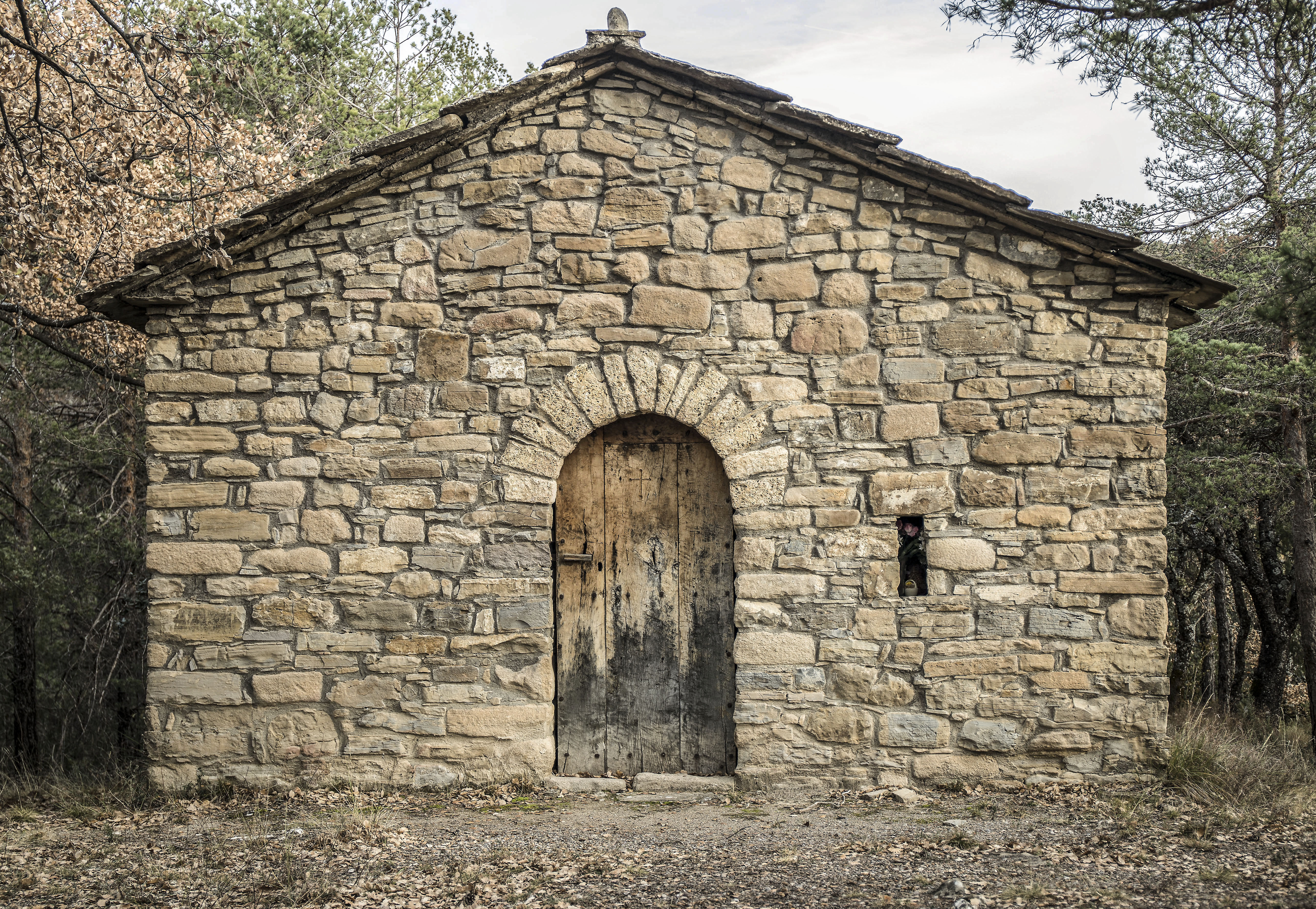 Pedrui (o Petroi) va ser un castre amb Roda d'Isàvena, actualment desaparegut, de la comarca històrica de la Ribagorça. El santuari de la Mare de Déu de Pedrui, església del castre, va ser consagrada el 5 de novembre de 972, pel bisbe Odesind de Ribagorça. (Viquipèdia)